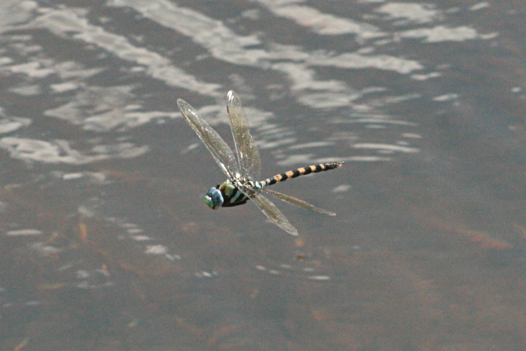 Anax immaculifrons Blue Darner from Valparai